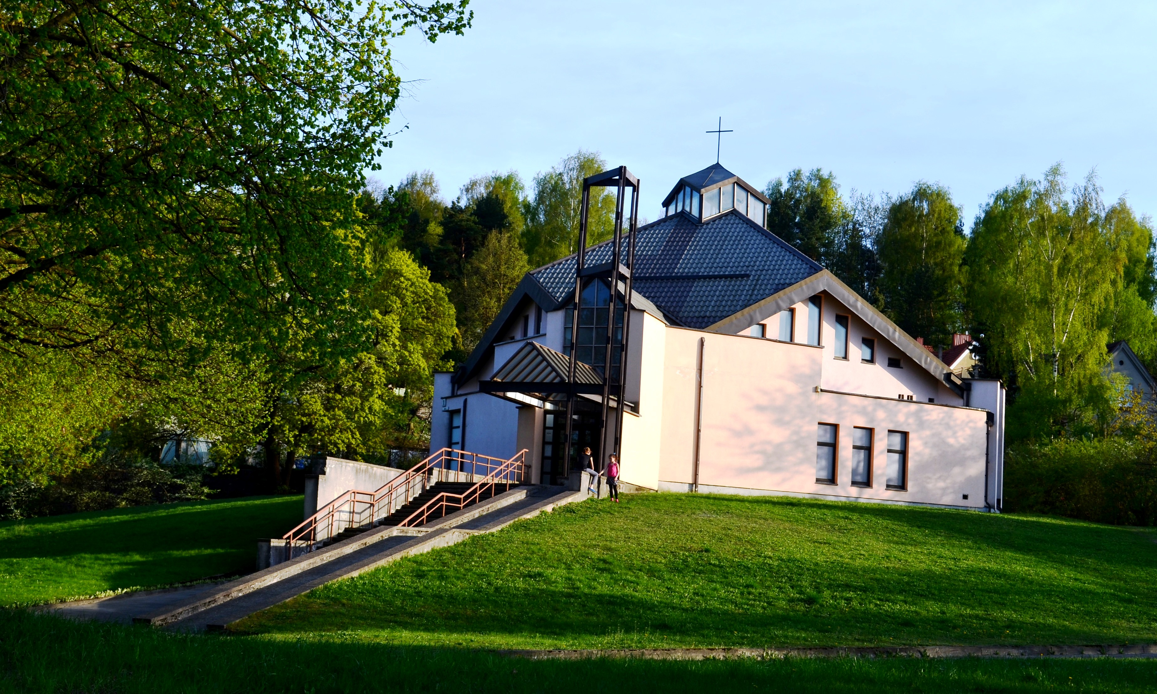 Naujoji Apaštalų Bažnyčia, Rasos, Vilnius